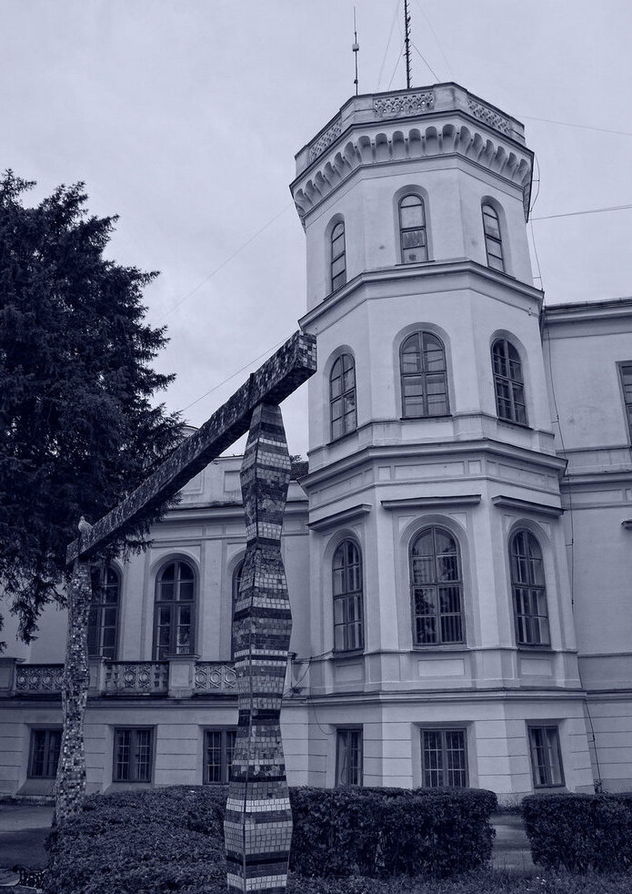 Sannicolau Mare, jud Timis Cod LMI TM-II- m-A-06287